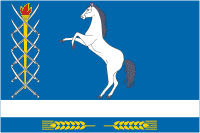 Флаг Лосевского сельского поселения, Краснодарский край, Россия.